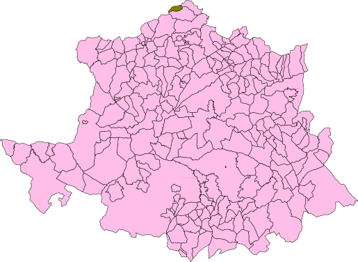 Casar de las Hurdes